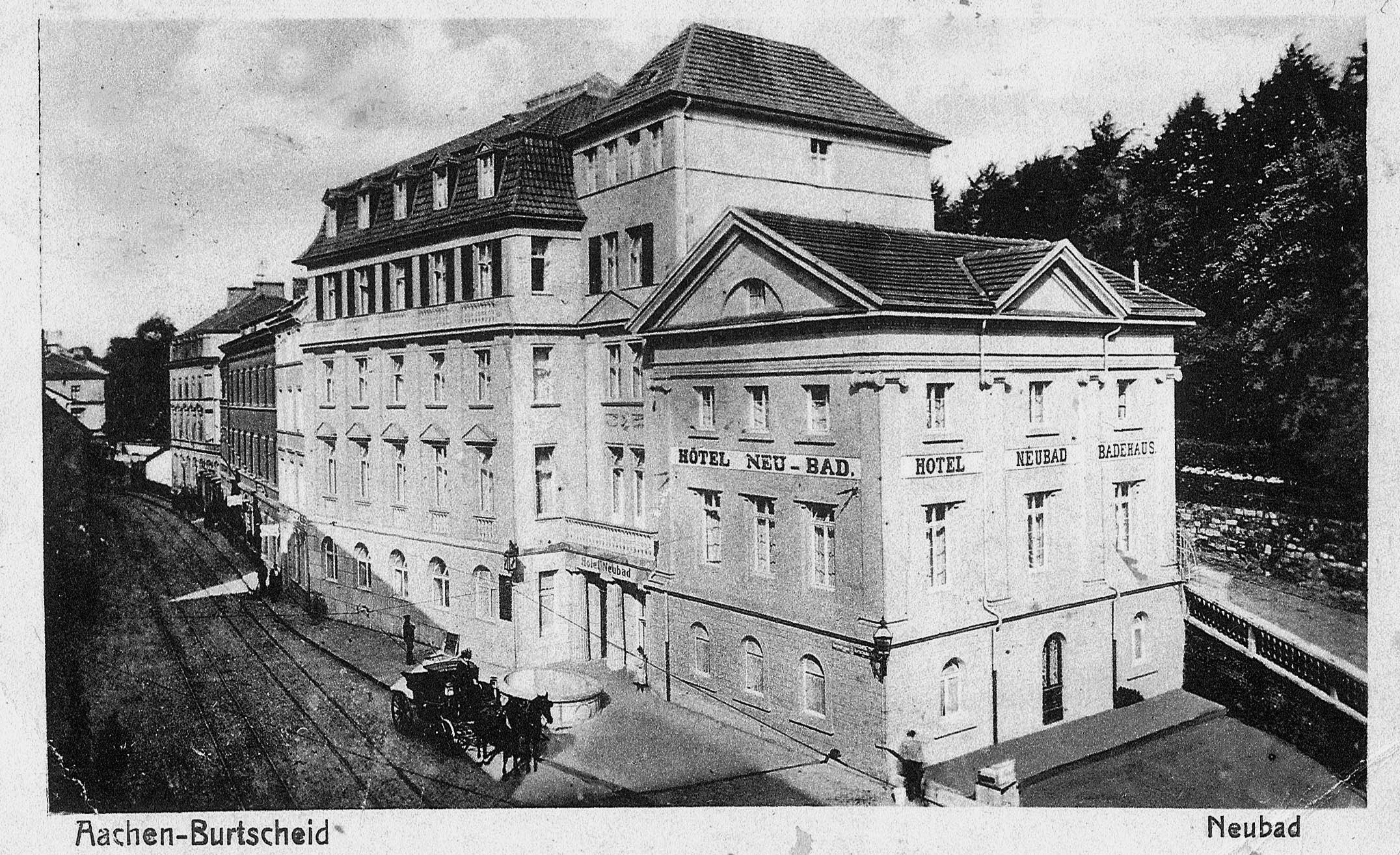 Das umgebaute Neubad in Burtscheid, Postkarte (1913 gelaufen)